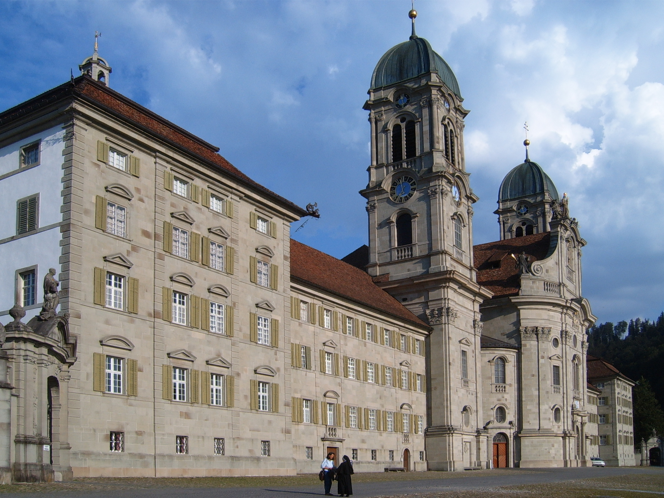 Einsiedeln Abbey, Canton of Schwyz (Switzerland)